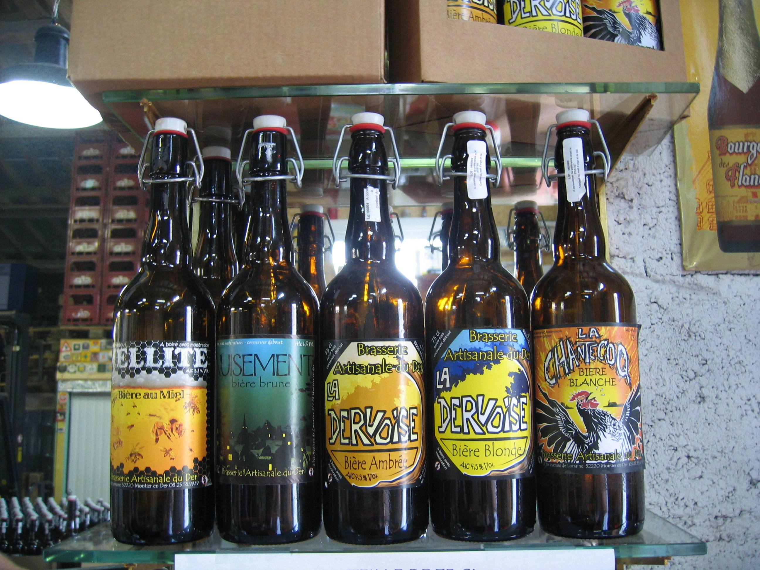 Bières de la brasserie du Der